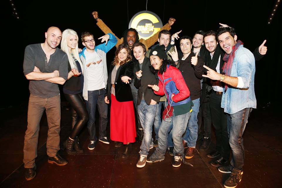 Spectacle avec la troupe du Swiss Comedy Club et ses invités